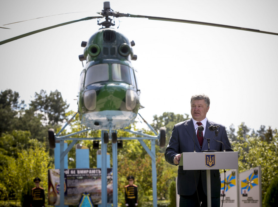 Робоча поїздка до Львівської області